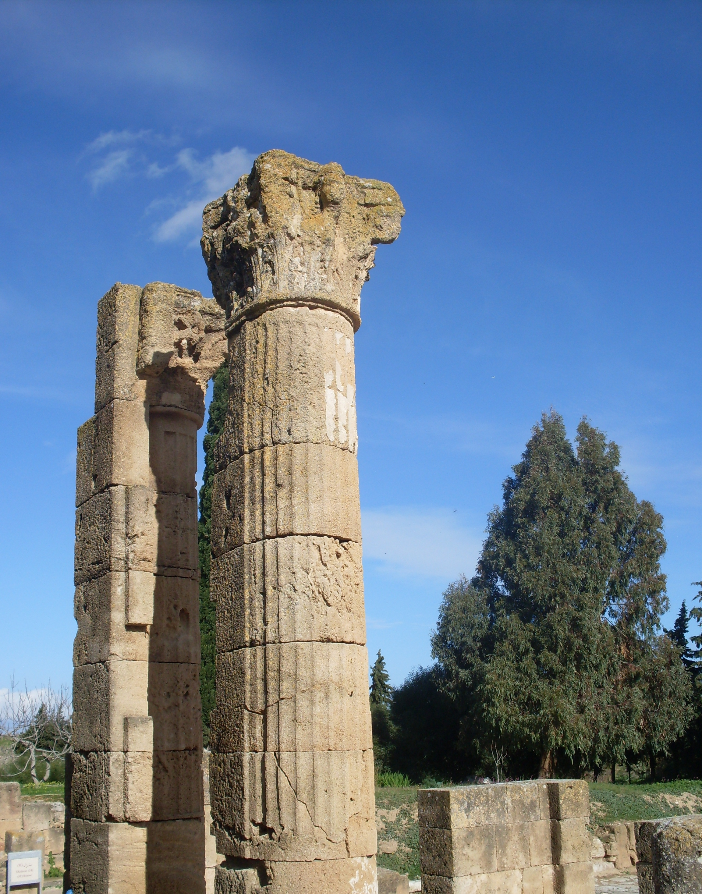 Vestiges d'habitations romaine, Utique